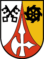 Gaschurn, Vorarlberg: Ein in Silber und Gold gespaltener Schild mit roter eingebogener Spitze, vorne schwarze gekreuzte Schlüssel, hinten ein schwarzes Wasserrad und in der Spitze eine silberne Hellebarde. (Verleihung: 17. August 1965)